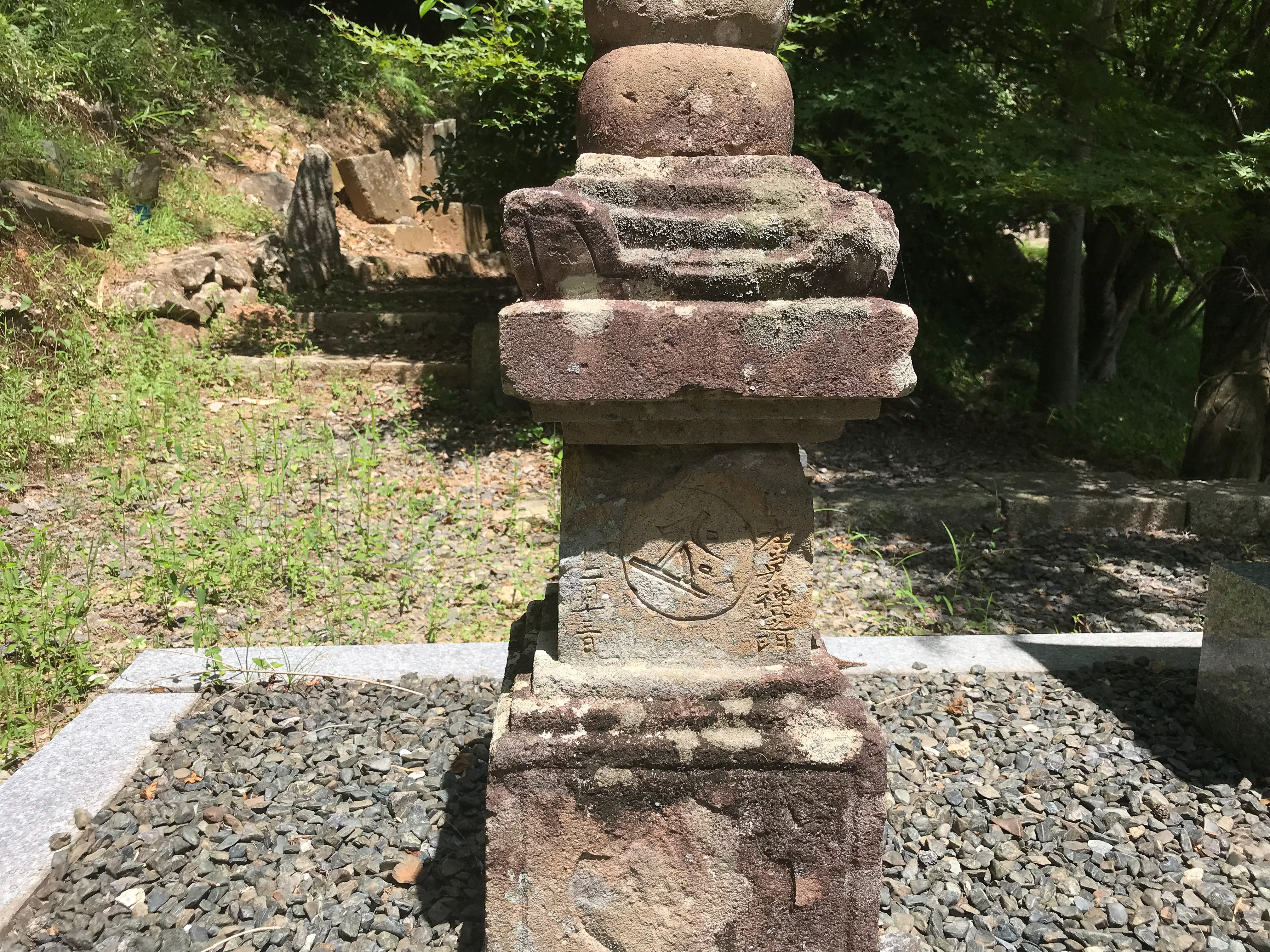 龍豊寺（山口県周南市大道理）にある陶興明供養のための宝篋印塔。一石型の平野石製宝篋印塔。明応四年（１４９５）の紀年銘がある。